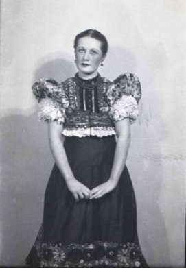 Garamszeghy Sándor: Matyólakodalom. Nemzeti Színház. Bemutató: 1934-12-31; Rendező: Rádai Dénes. Kati: Somogyi Erzsi.